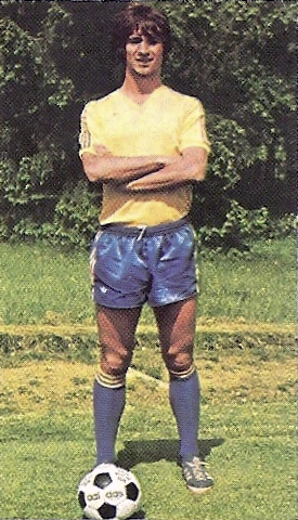 Rolland Courbis en 1976 (FC Sochaux), 'Football 77', Panini figurina n°319.